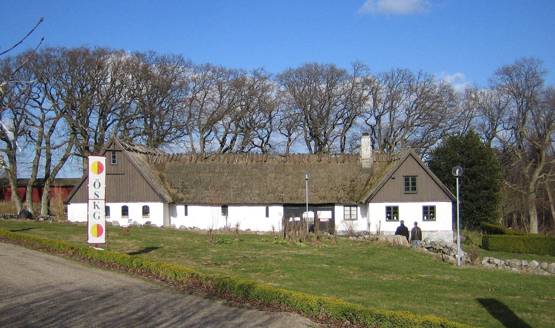 Tjörnedalagården in Baskemölla, Sweden.